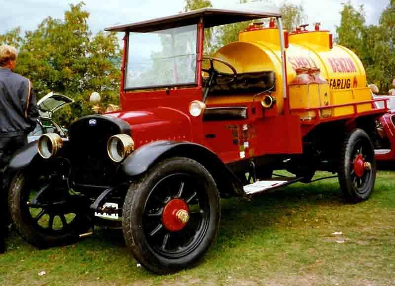 GMC Tanker 1919